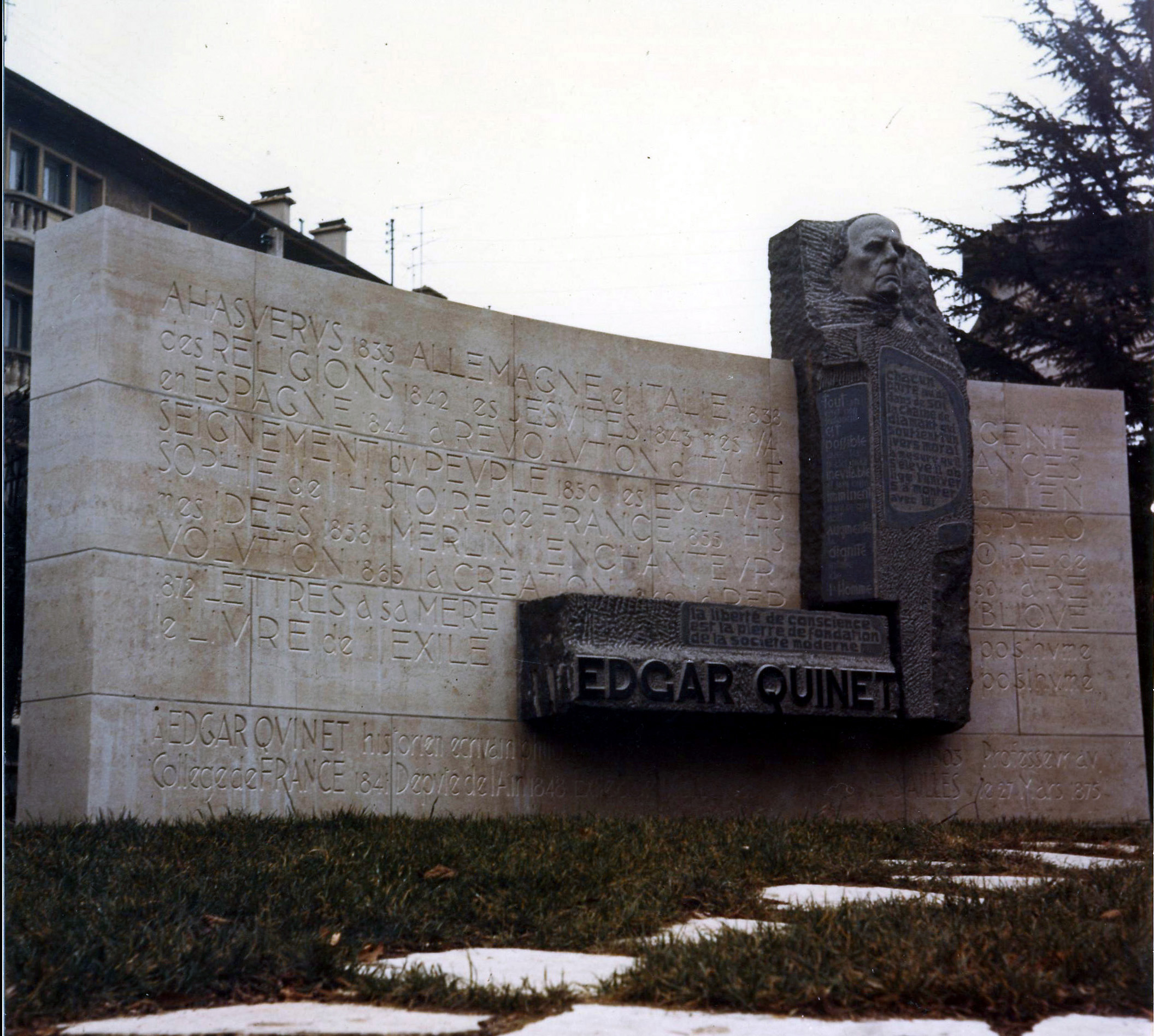 Monument à Edgar Quinet à Bourg-en-Bresse- oeuvre du sculpteur Marcel Mayer